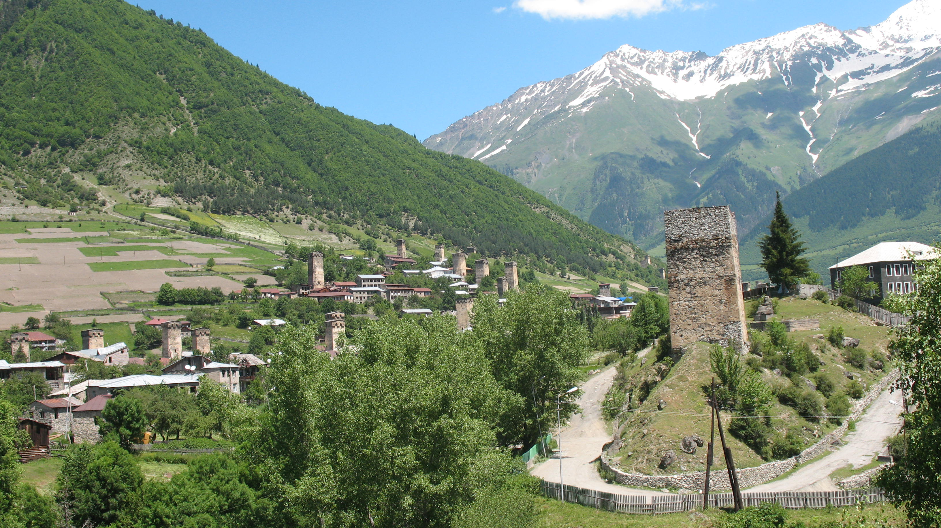 Mestia